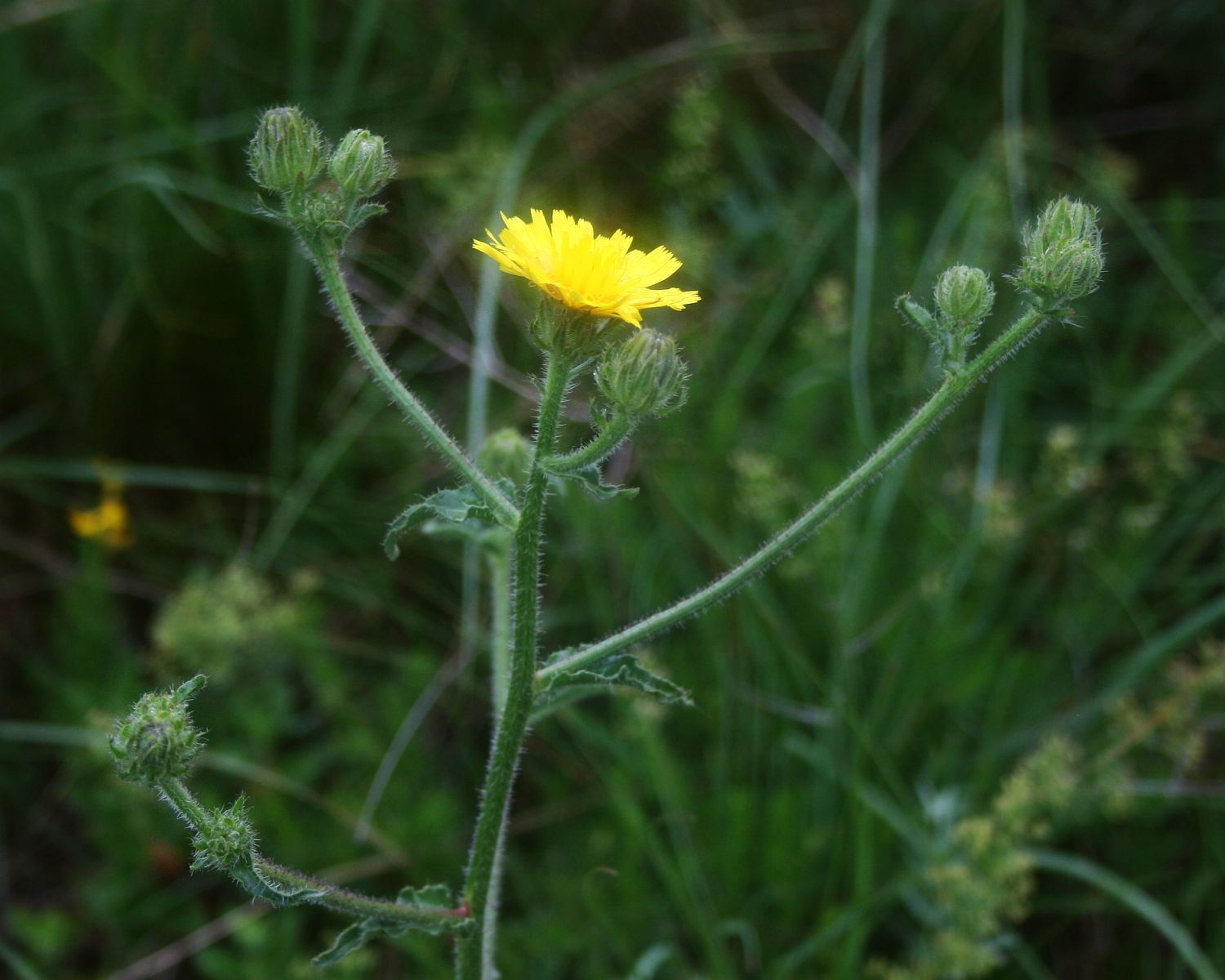 Borsten-Pippau (Crepis setosa), Korbblütler (Asteraceae) - Slowenien/Slovenija/Slovenia: Primorska, an der Straße ca. 2,5 km NW Podgorje